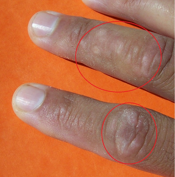 Psoriasis pustuleux localisé leucoderme. Les pustules s’étalent et fusionnent. Elles touchent assez rarement la face postérieure des doigts.